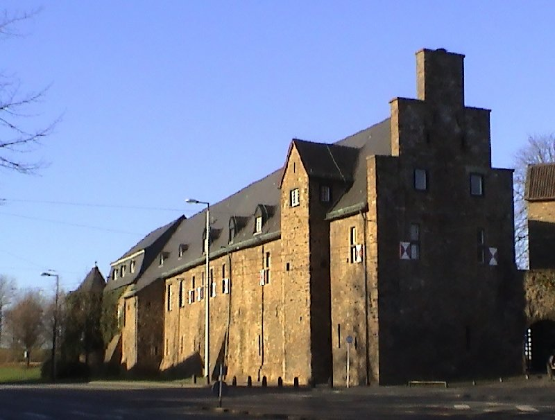 Beschreibung: Mülheim an der Ruhr: Schloss Broich Quelle: Benutzer:W.wolny selbst fotografiert am 15. Januar 2005 2005-01-15 17:30:01 . . W.wolny (Diskussion) . . 800 x 606 (73312 Byte) Lizenz